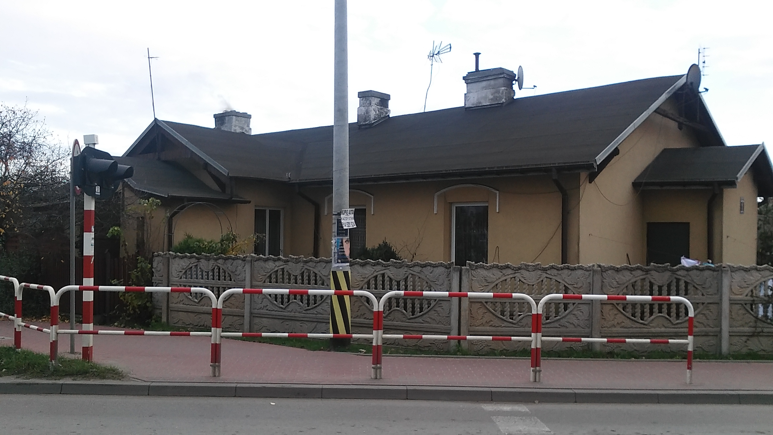 przystanek kolejowy Kobyłka Ossów - XIX-wieczny budynek dróżnika, tzw. "koszarka"